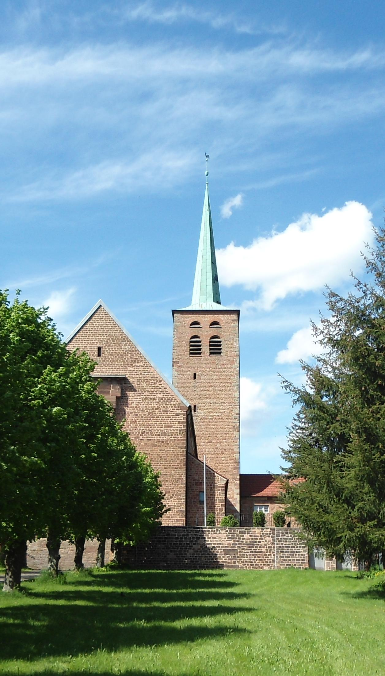 Die Herz Jesu Kirche in Hassel/Saar